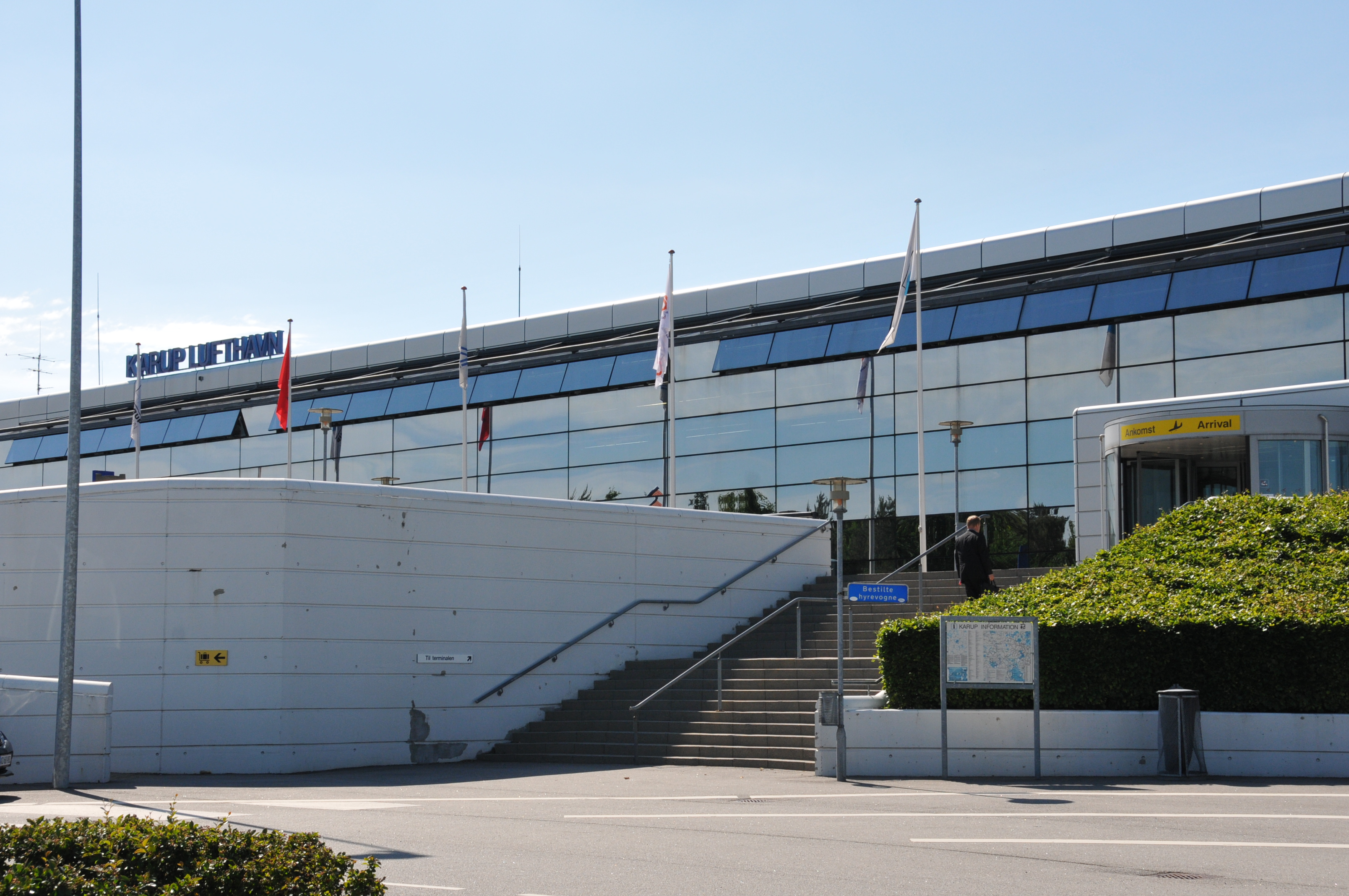 Terminalbygningen ved Karup Lufthavn.